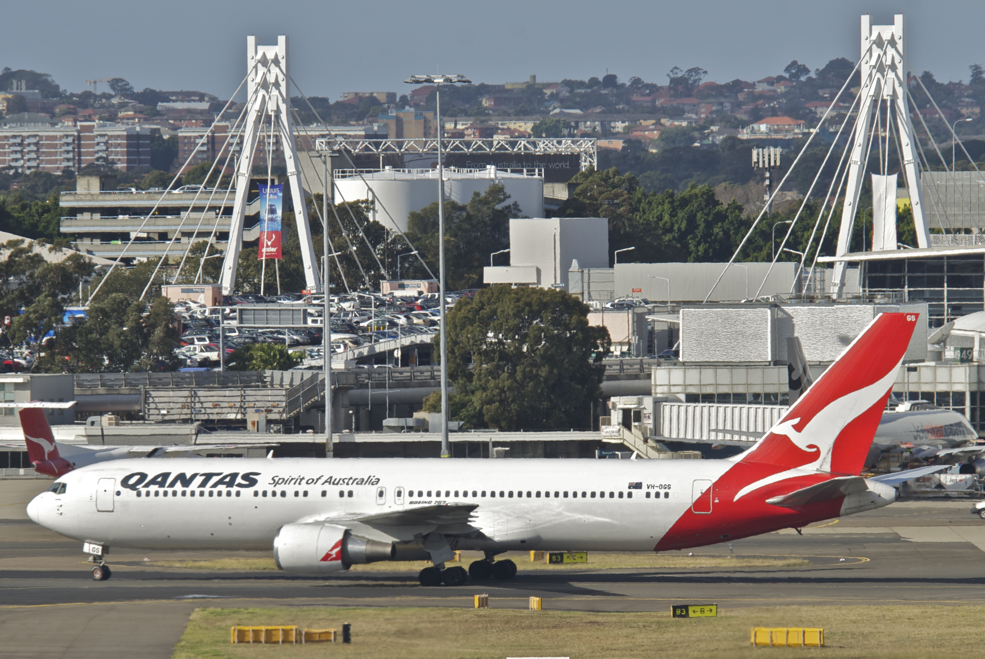 Qantas Boeing 767-300; VH-OGS@SYD;31.07.2012/666id